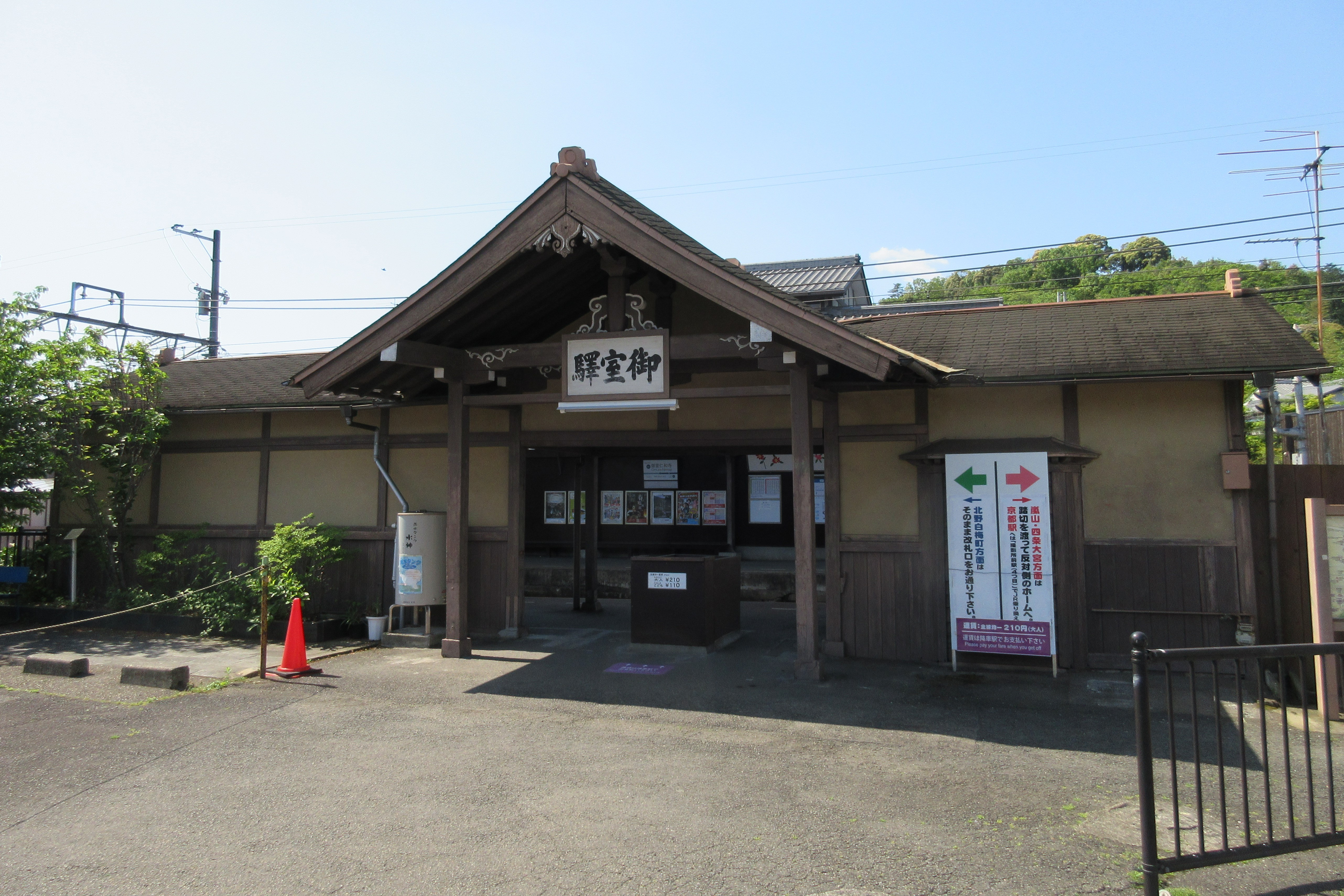 京福電鉄御室仁和寺駅